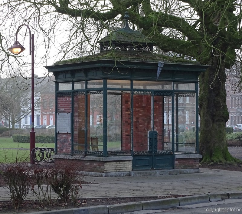 Ancienne aubette du tramway, place Crombez à Tournai devant la gare.